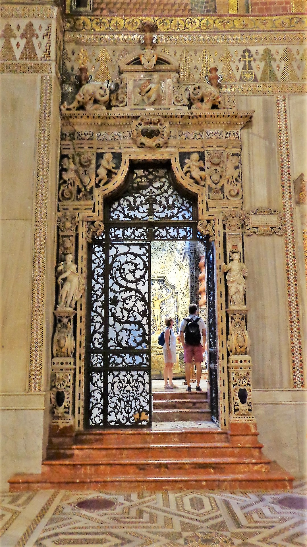 Cappella del Crocifisso, portale d'ingresso. Giovan Battista Ferrera e Baldassare Pampillonia. Angelo Italia.